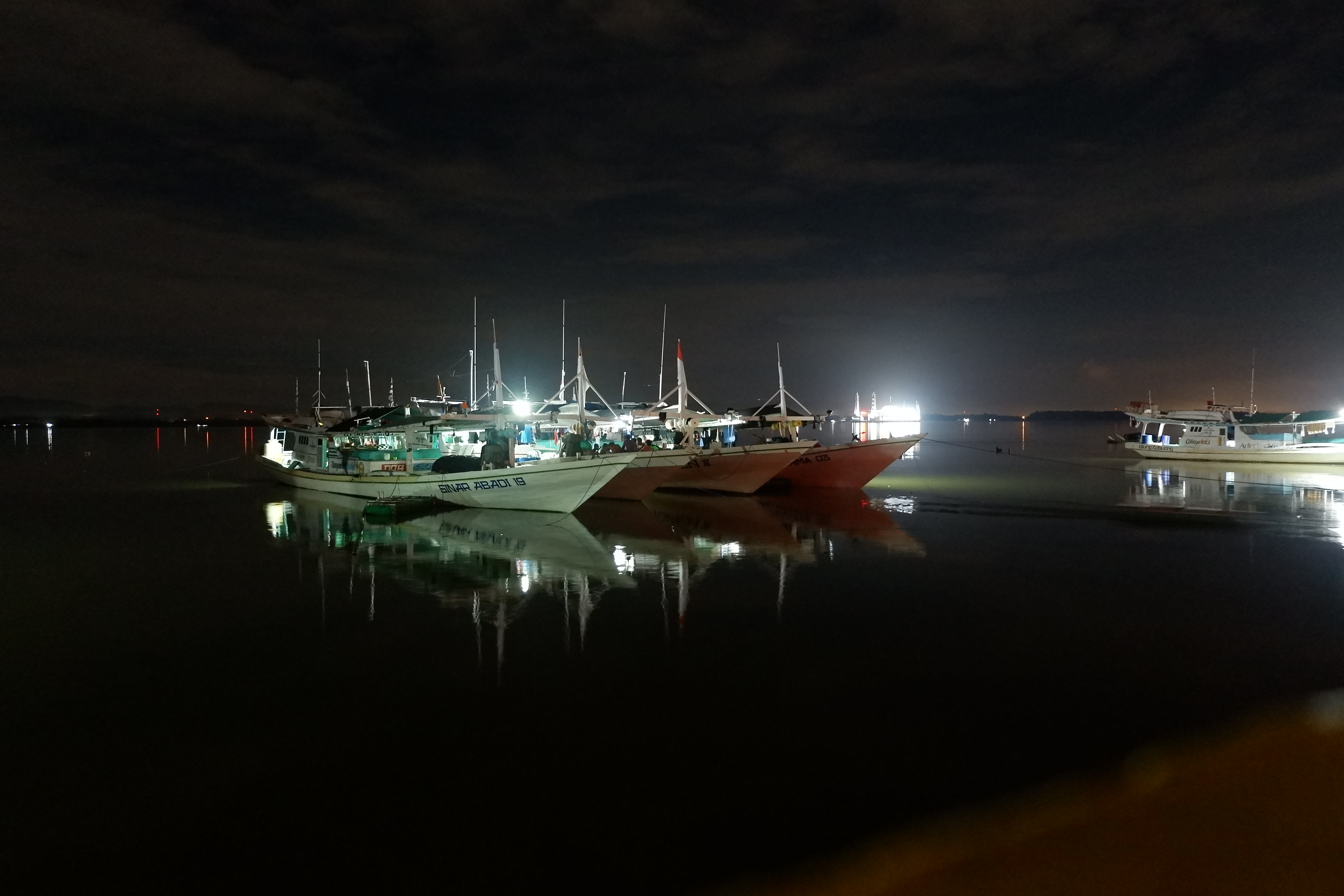 Pemandangan kapal nelayan di Teluk Kendari